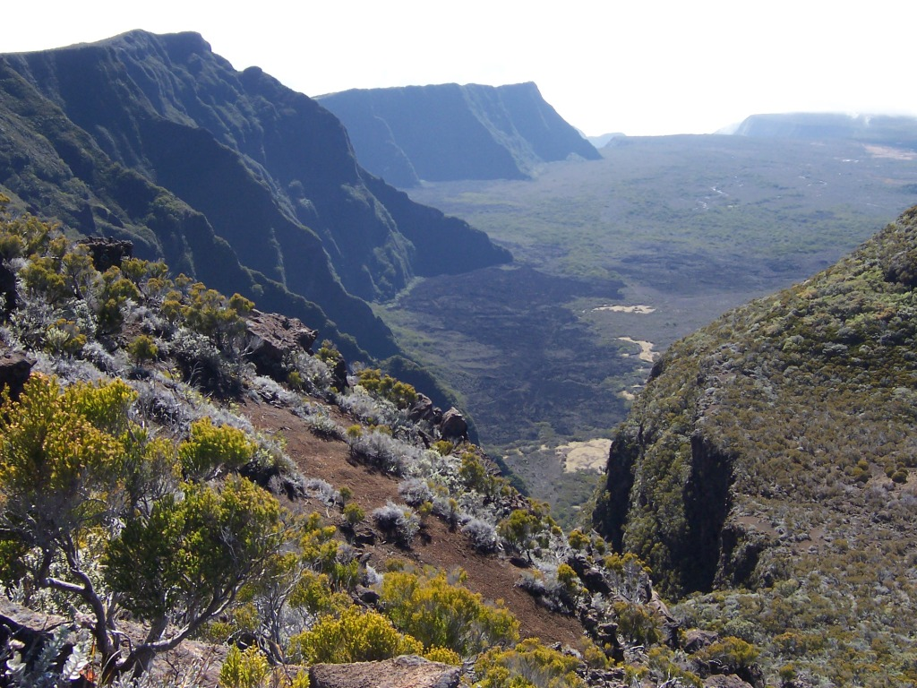 Fond de la rivière de l'est Wells of the East River Photo: B.navez - 01 SEP 2005 - Réunion island